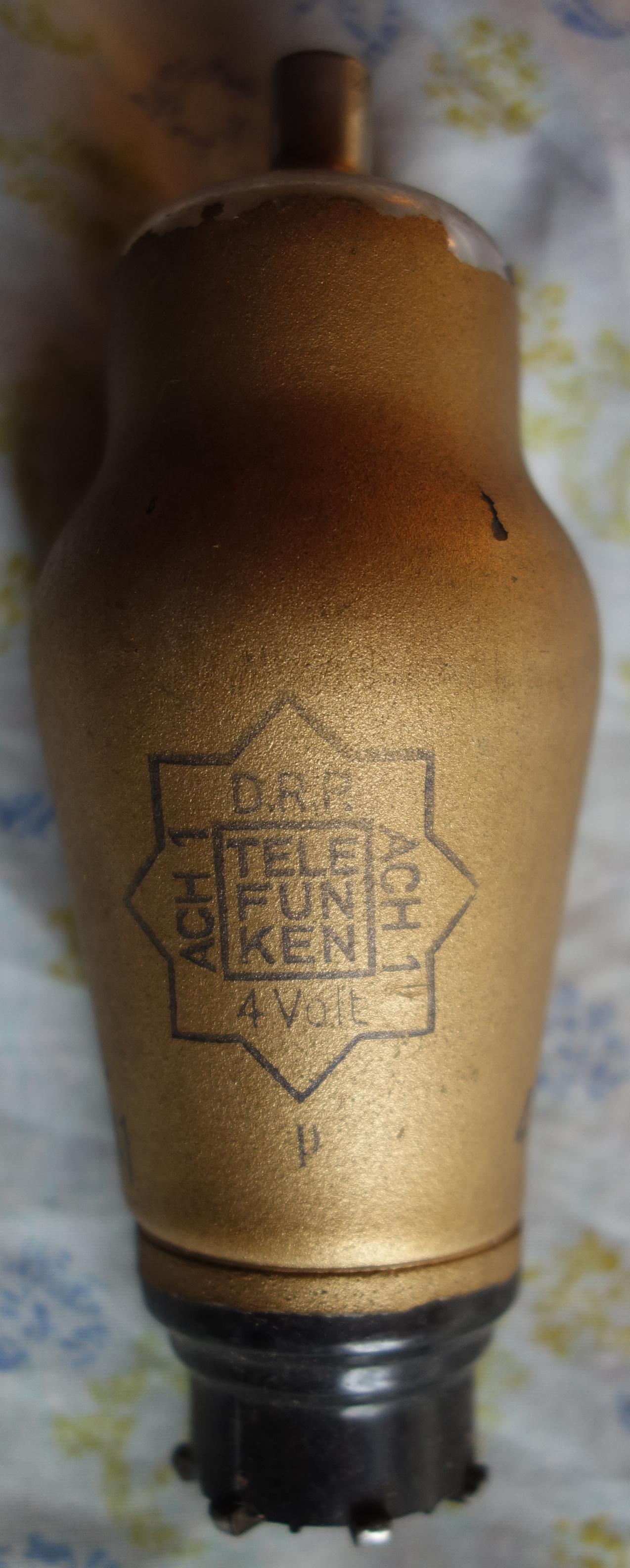 ACH1 Telefunken triode-hexode